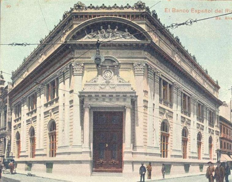 La sede del Banco Español del Río de la Plata en la ciudad de Buenos Aires, Argentina. Diseñada por Carlos Agote e inaugurada en 1905, fue demolida en 2000 para construir allí la Torre del Banco Galicia.